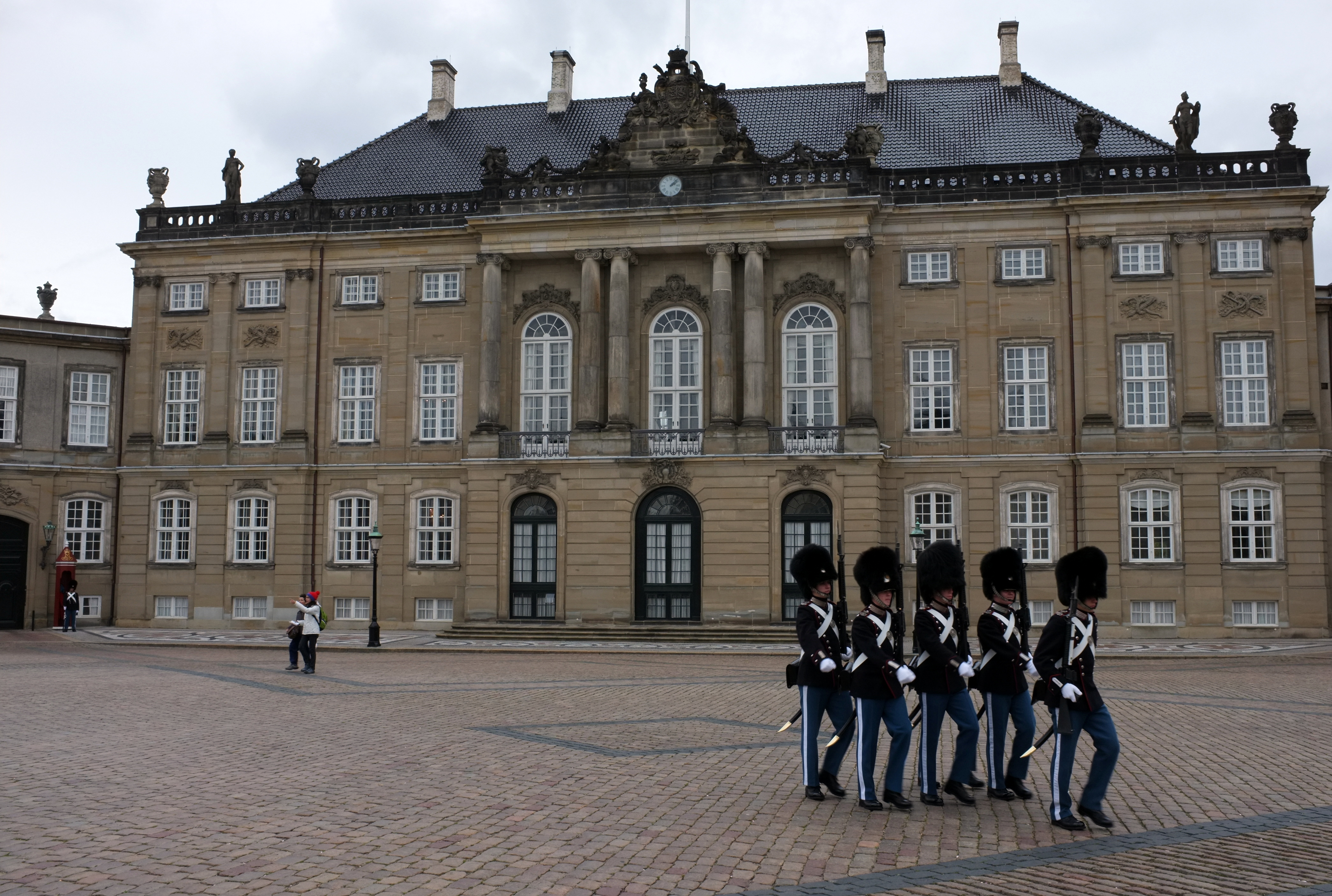 Amalienborg Palace